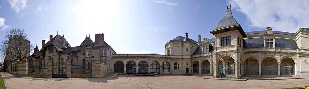 vue panoramique de la façade du musée Anne de Beaujeu à droite et de la Maison Mantin à gauche